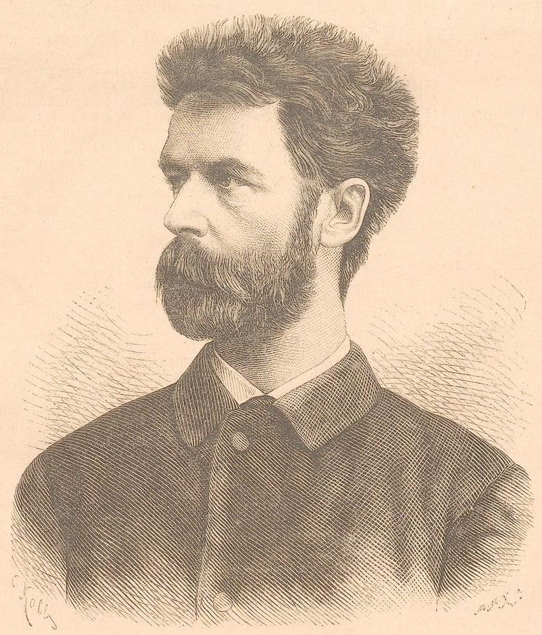 Hermann Kaulbach. In: Illustriertes Unterhaltungs-Blatt: wöchentliche Beilage zum Darmstädter Tagblatt. Darmstadt, 1889